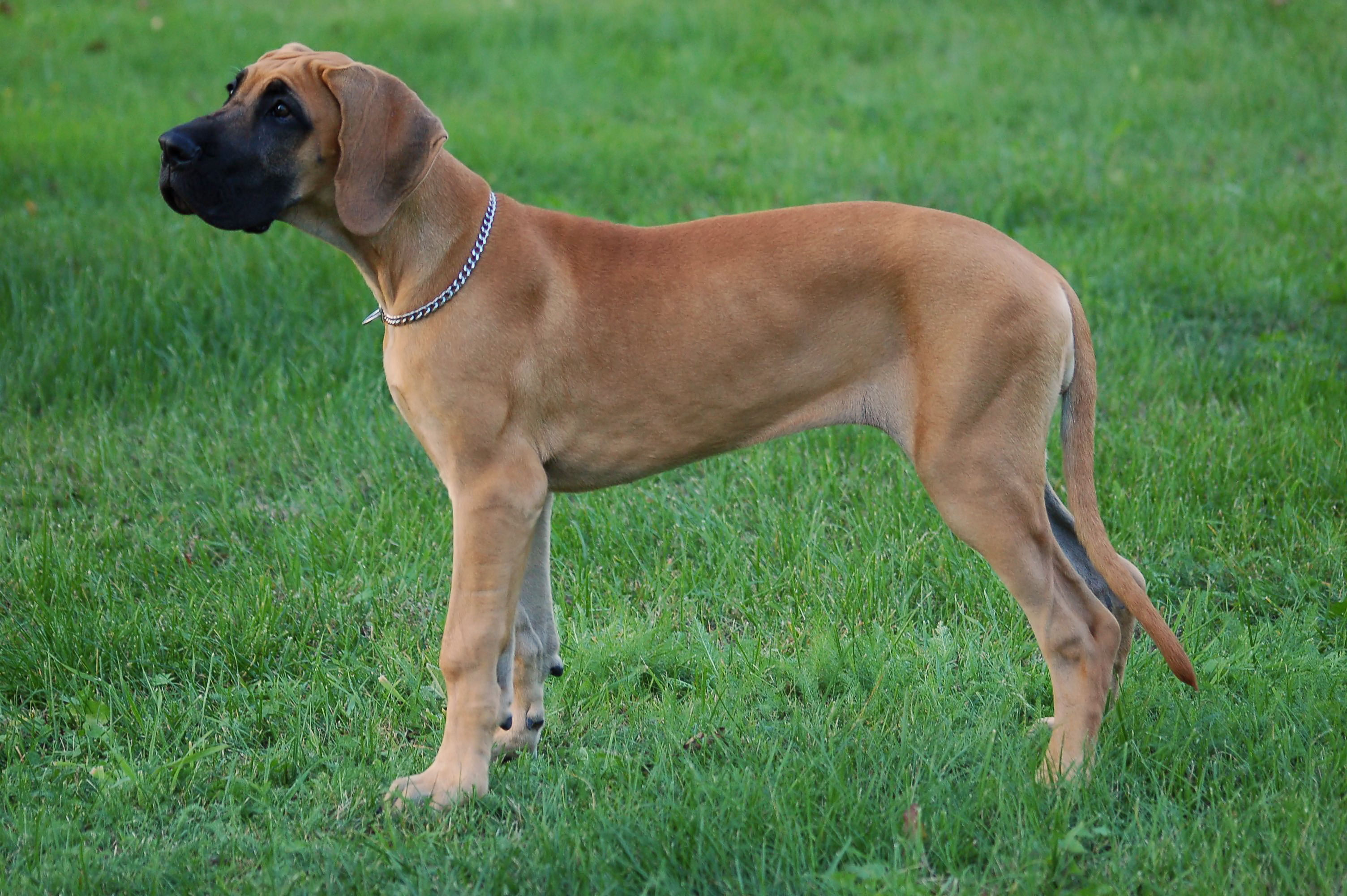 Great Dane, 14 weeks